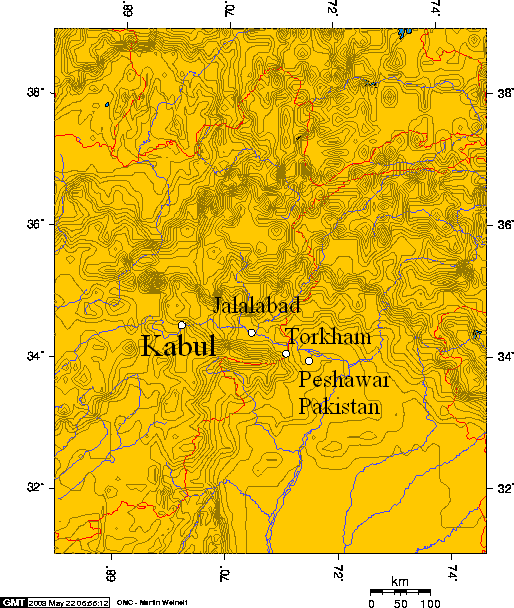 Khyber Pass, and Kabul, Jalalabad, Torkham, Peshawar.